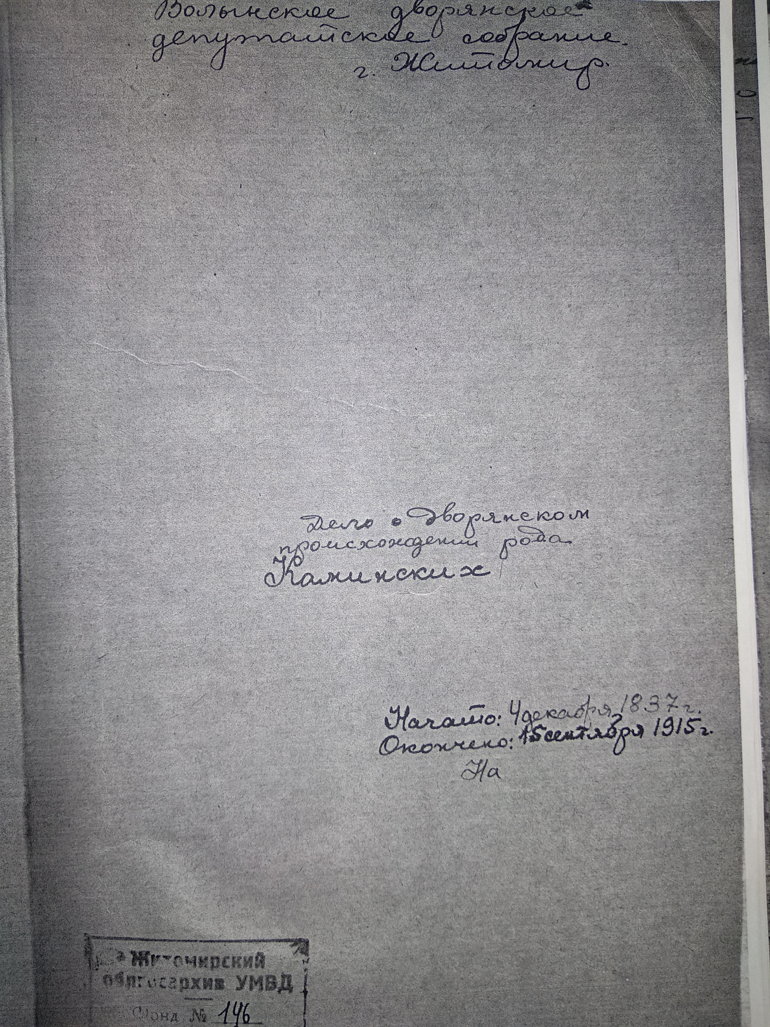 Данный документ является фотокопией документа из Государственного архива украины Житомирской области, ф. 146, оп. 1, 2701, тит.л.